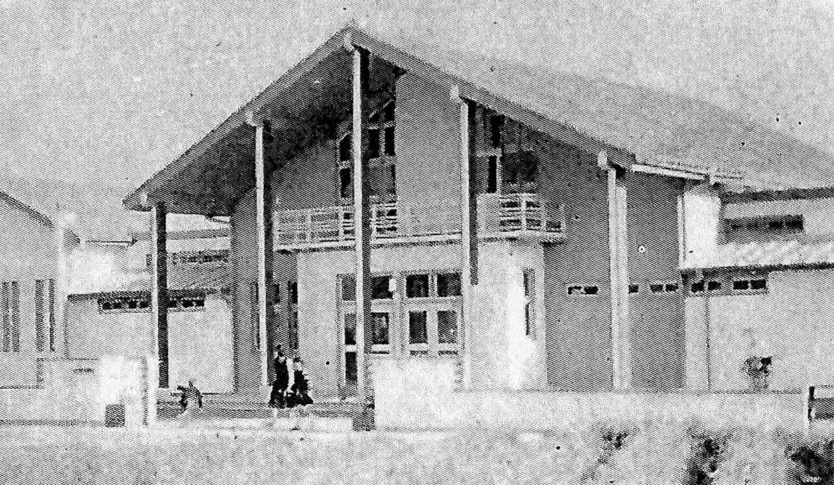 伊丹市図書館（1955年頃）